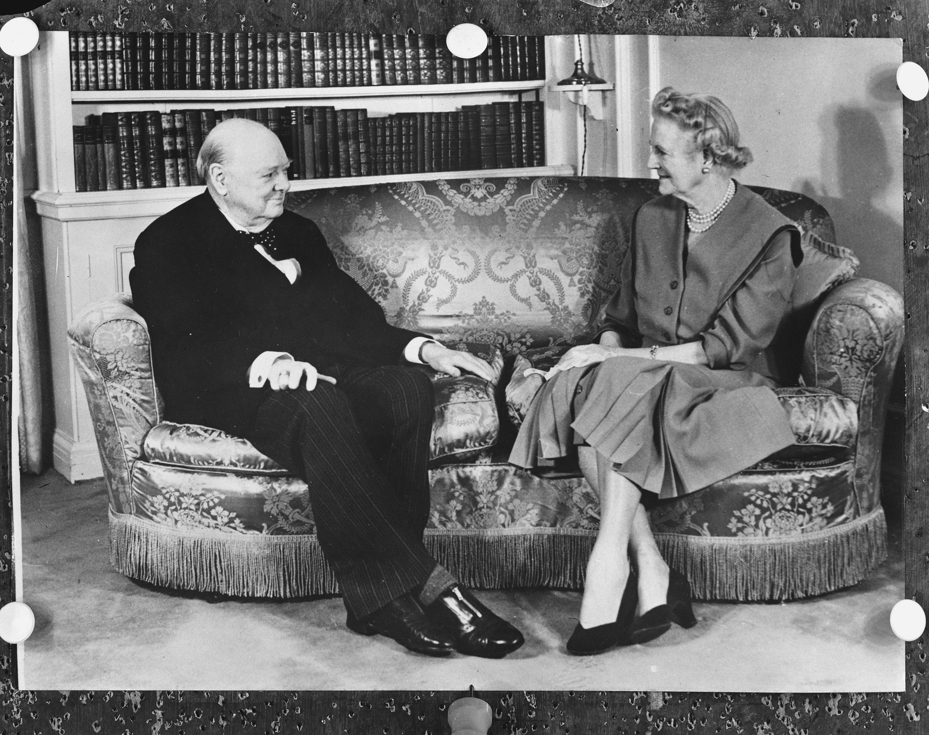 Collectie / Archief : Fotocollectie Anefo Reportage / Serie : [ onbekend ] Beschrijving : Het echtpaar Churchill 50 jaar gehuwd Datum : 9 september 1958 Fotograaf : Fotograaf Onbekend / Anefo Auteursrechthebbende : Nationaal Archief Materiaalsoort : Glasnegatief Nummer archiefinventaris : bekijk toegang 2.24.01.09 Bestanddeelnummer : 909-8364